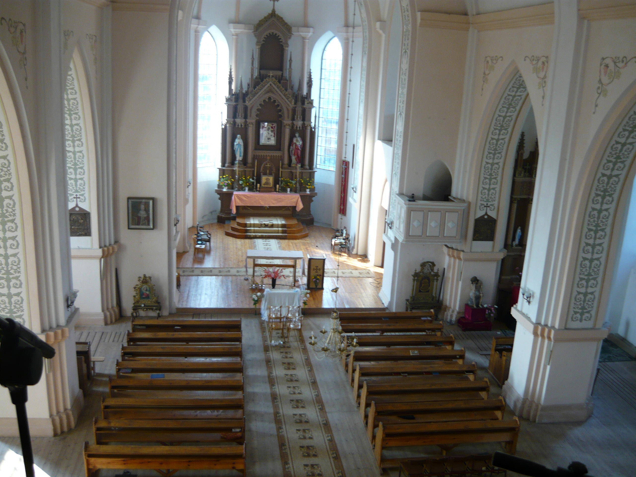 Беларуская (тарашкевіца): Касьцёл Маці Божай Ружанцавай. в. Ракаў This is a photo of Belarusian heritage monument. Reference number: 613Г000096 ( WLM)